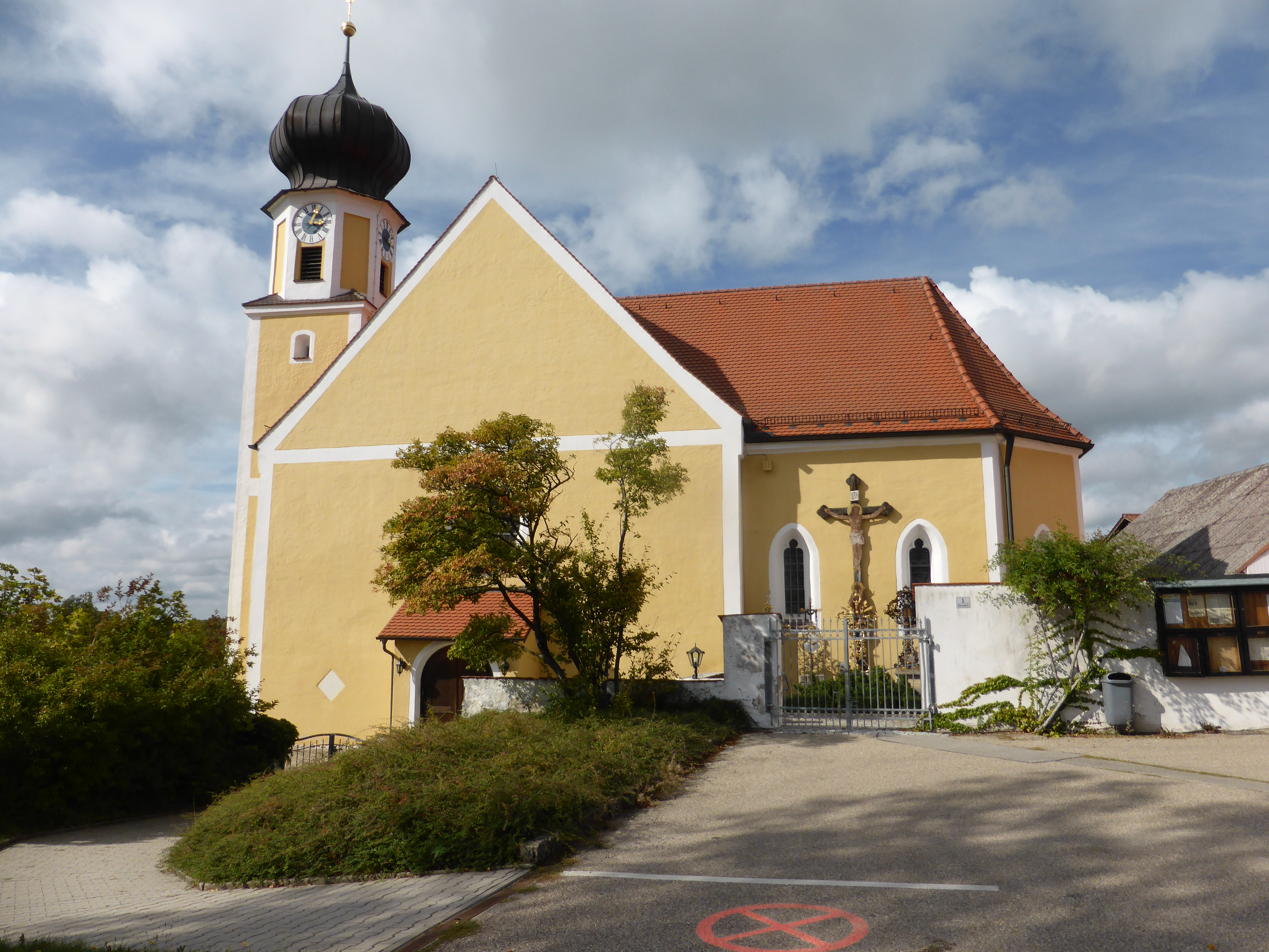 Kirche Mariä Geburt (Frauenberg) bei Brunn (Oberpfalz)